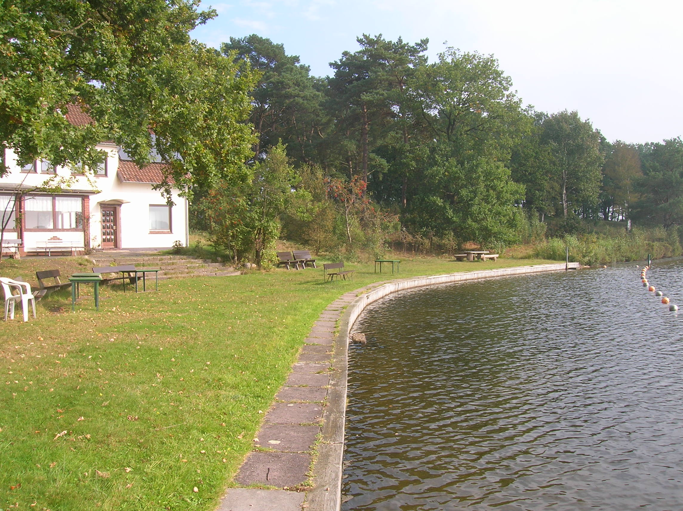 Badestelle des Naturfreundehauses am Wollingster See